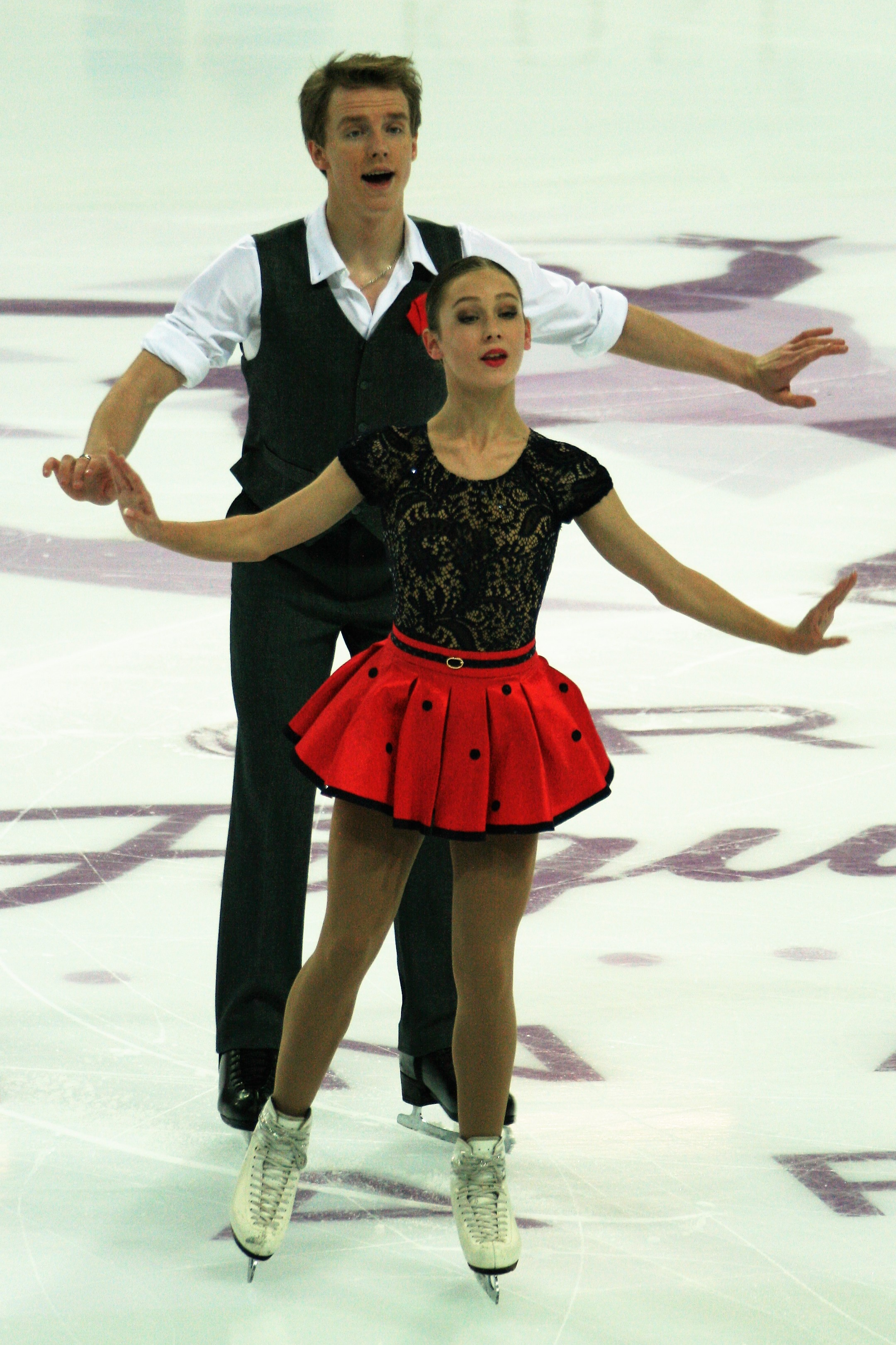 Амина Атаханова / Илья Спиридонов (Россия) на финале Гран-при по фигурному катанию среди юниоров 2016-2017